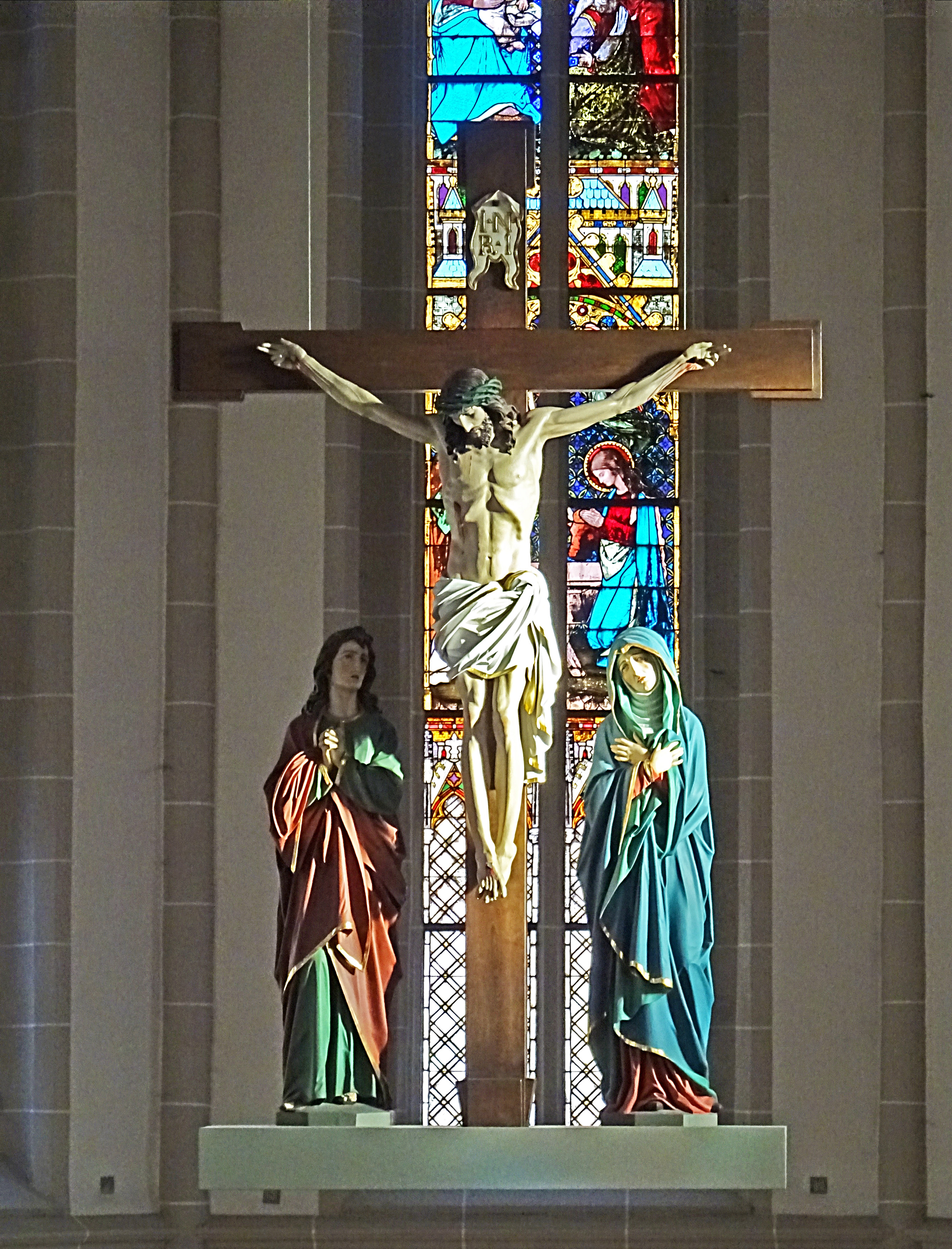 Kreuzigungsgruppe in der Pfarrkirche St. Gertrud (Dingelstädt)